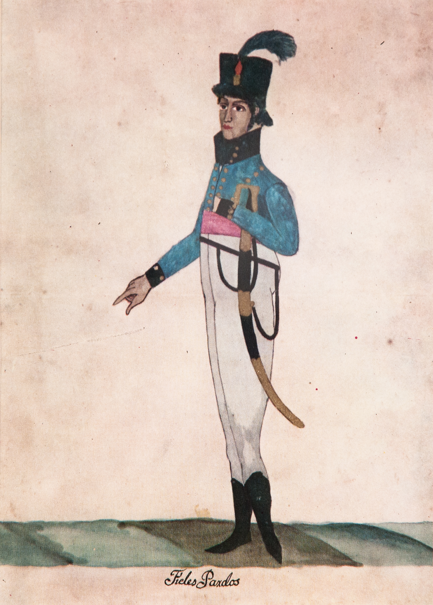 Serie de acuarelas originales de la época de la Independencia de la Argentina de soldados de los Regimientos Patriotas.